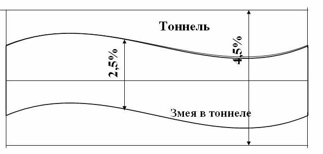 Рисунок, иллюстрирующий европейскую валютную змею в тоннеле